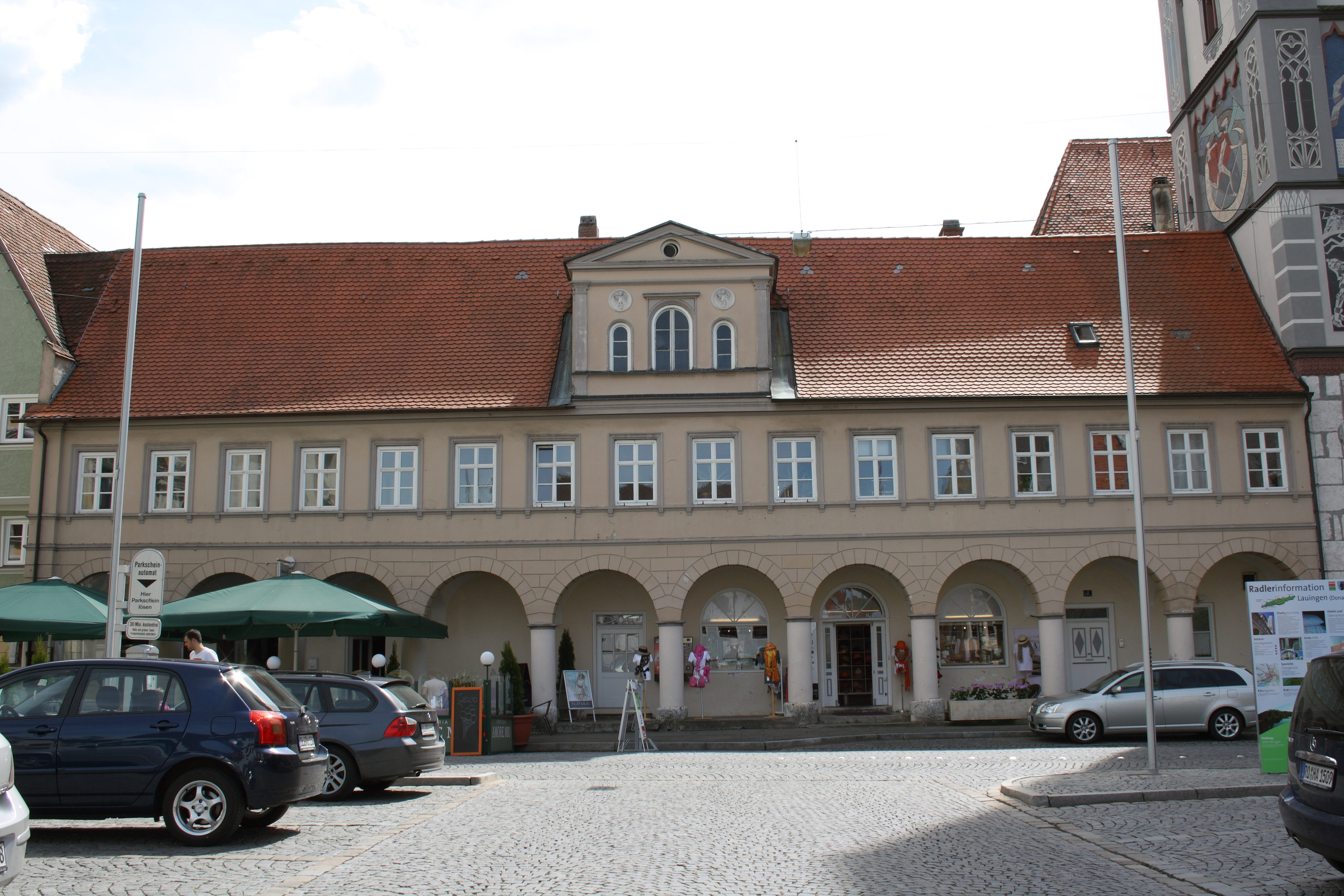 ehemalige Schupfe in Lauingen im Landkreis Dillingen an der Donau (Bayern), Imhofstraße 1,2